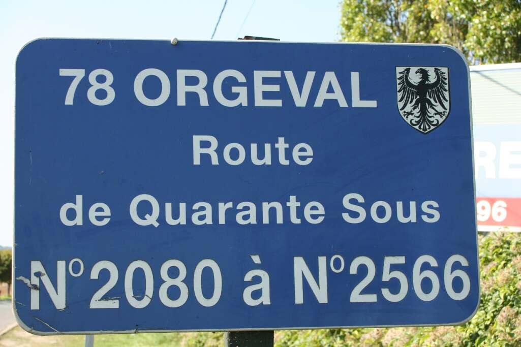 Plaque de rue à Orgeval - Yvelines (France)